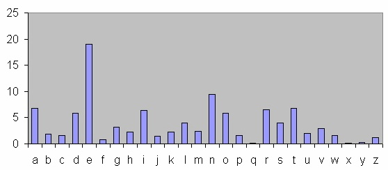 The frequency of letters used in a piece of common dutch text